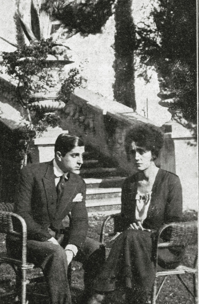 La casa che brucia - regia di Mario Corsi - prod "Tespi Film - 1919 - foto scena Pietro Pezzullo + Lina Millefleurs